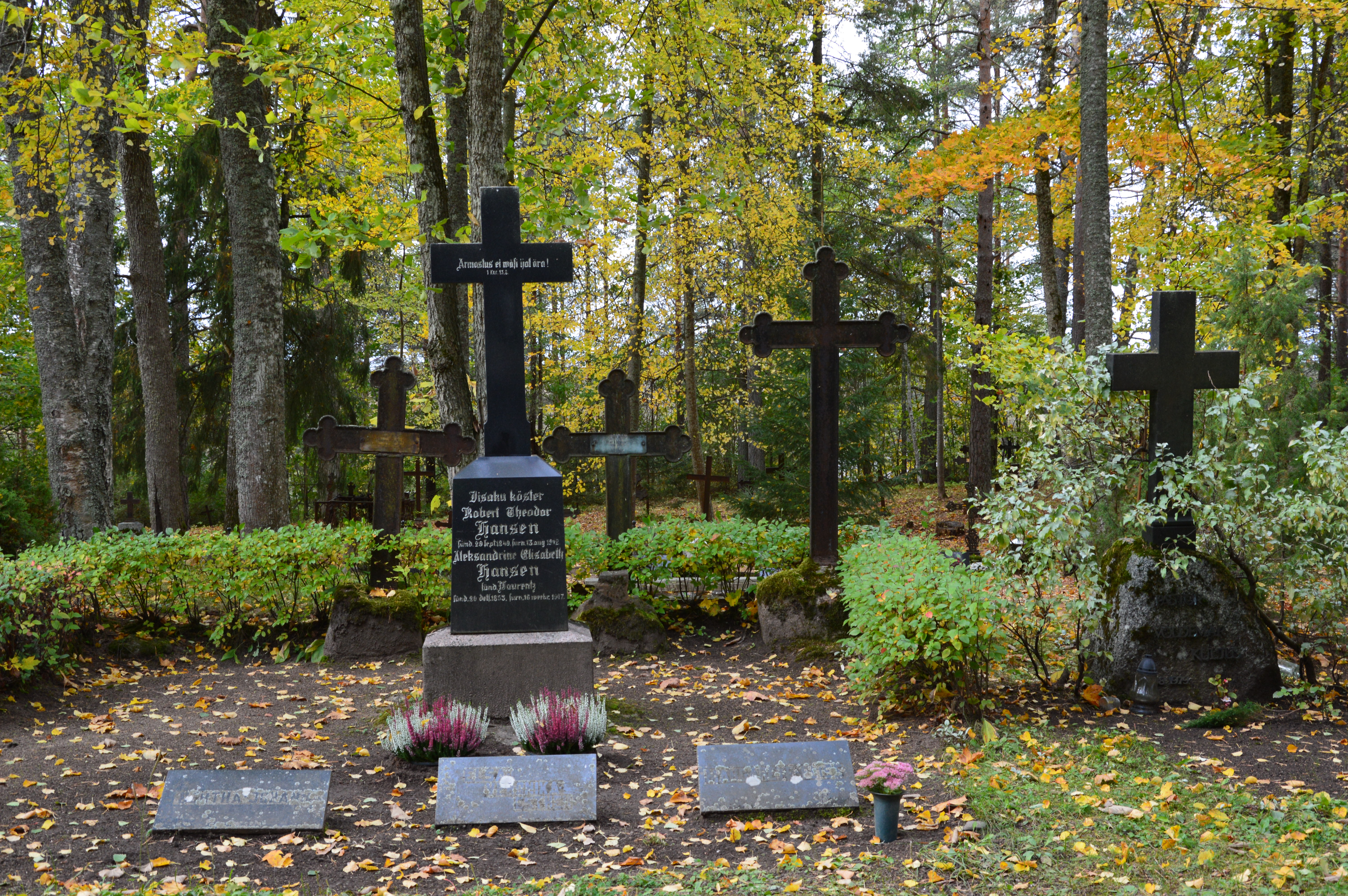 Hauad Iisaku kalmistul. Robert Theodor Hansen ja Aleksandrine Elisabeth Hansen.